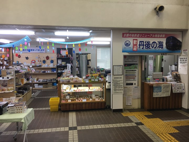 2017年4月9日撮影